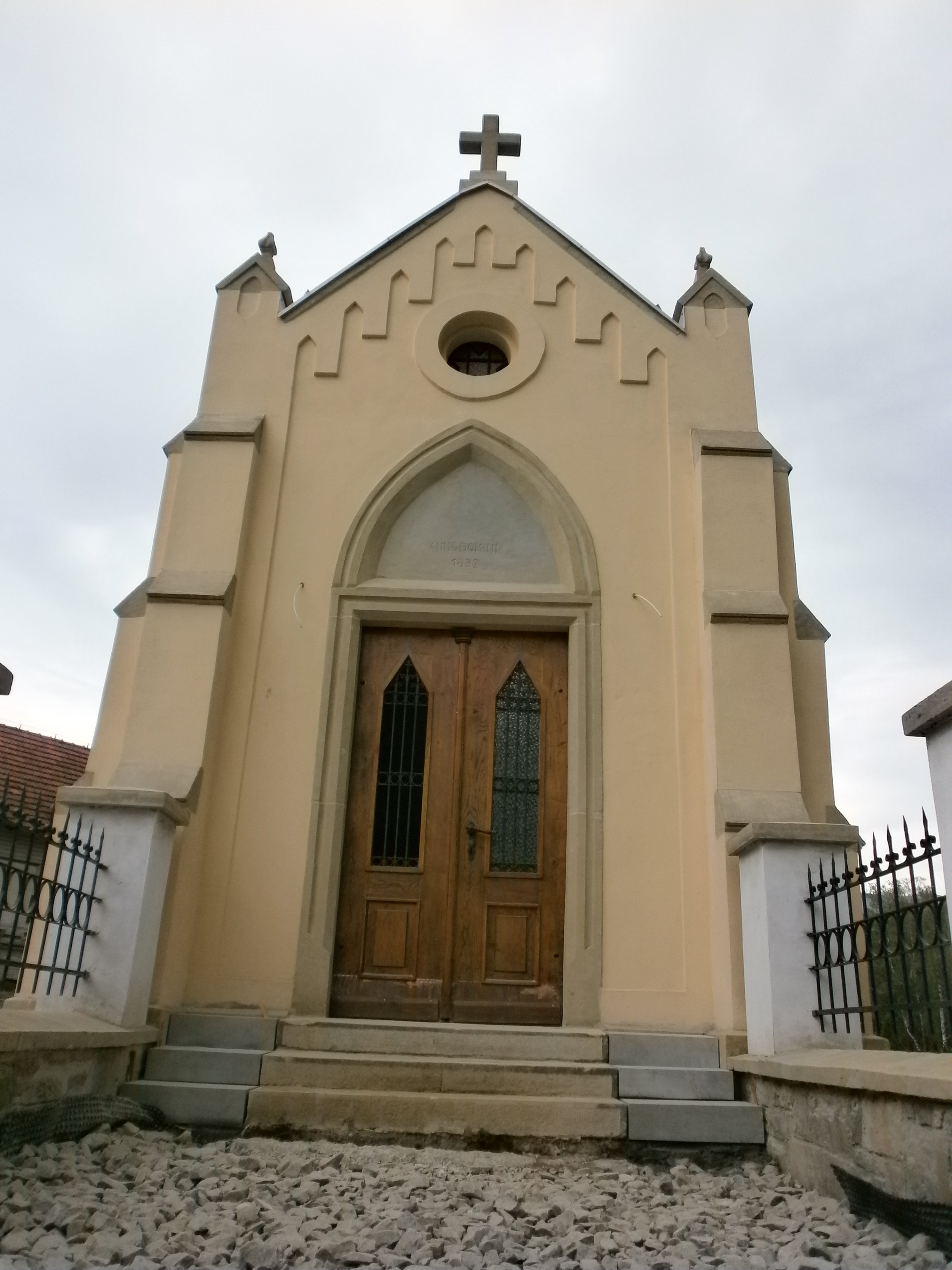 Tymbark, kaplica grobowa rodz. Myszkowskich, 1875